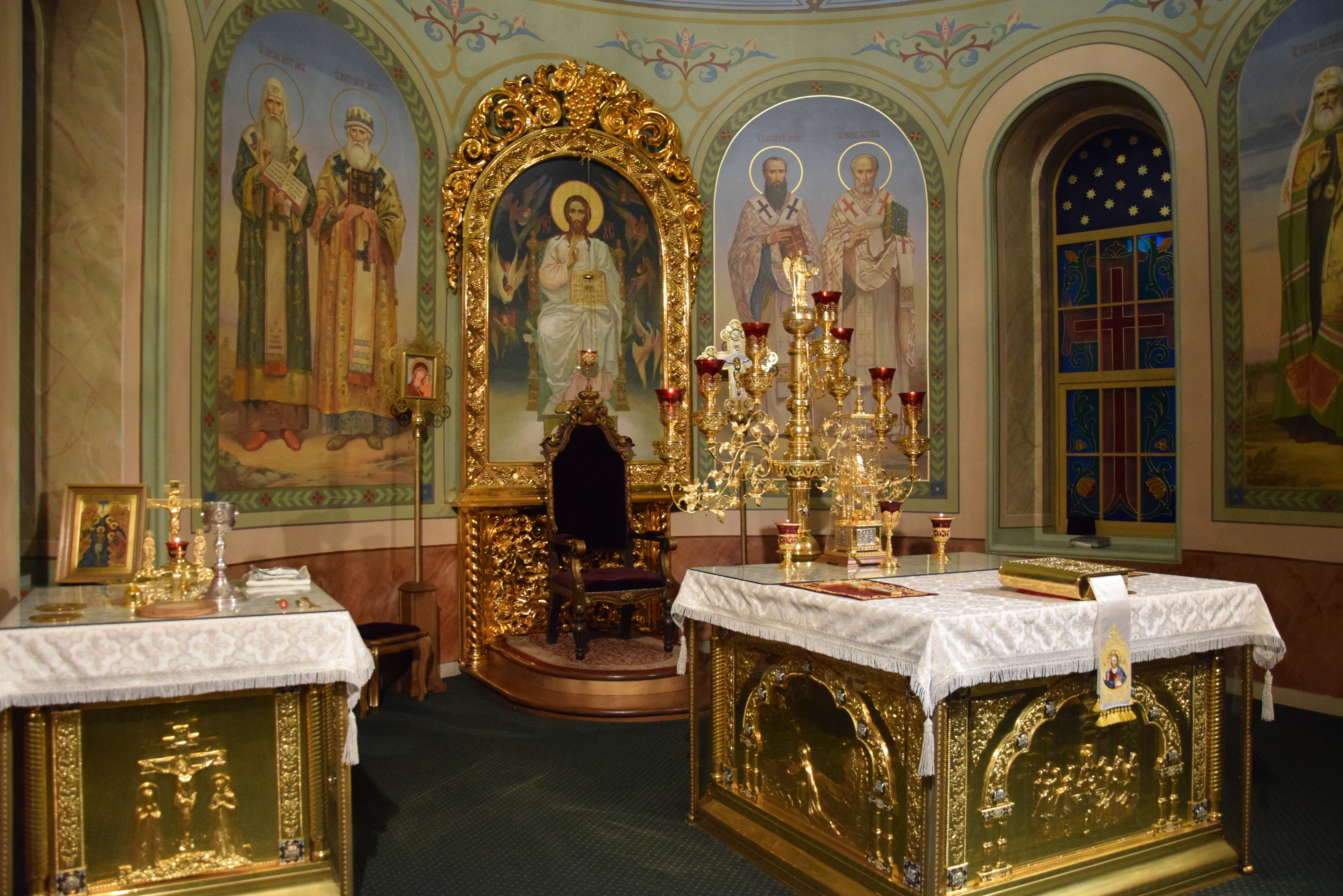 Алтарь главного придела